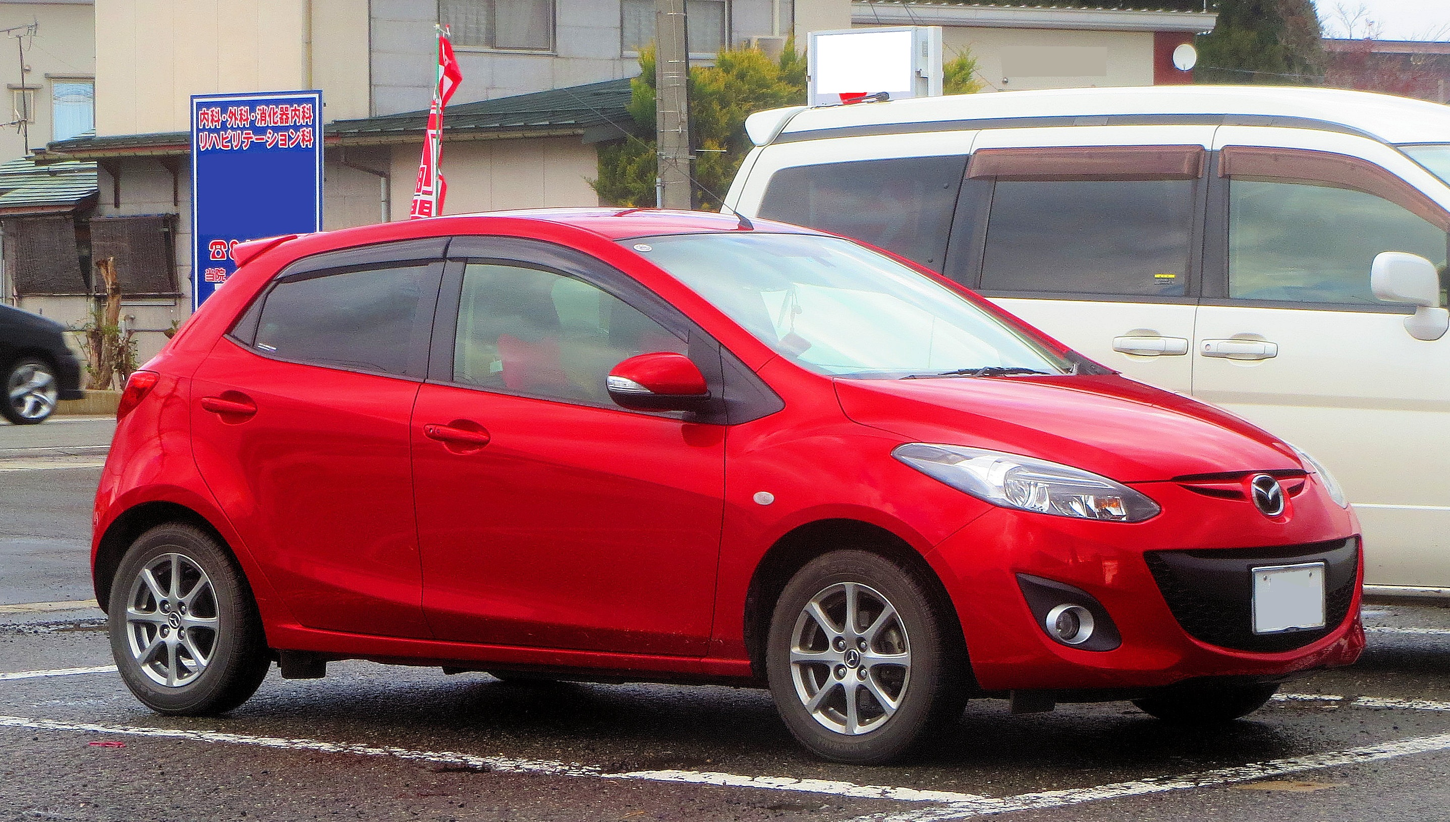 マツダ デミオ 13-SKYACTIV シューティングスター